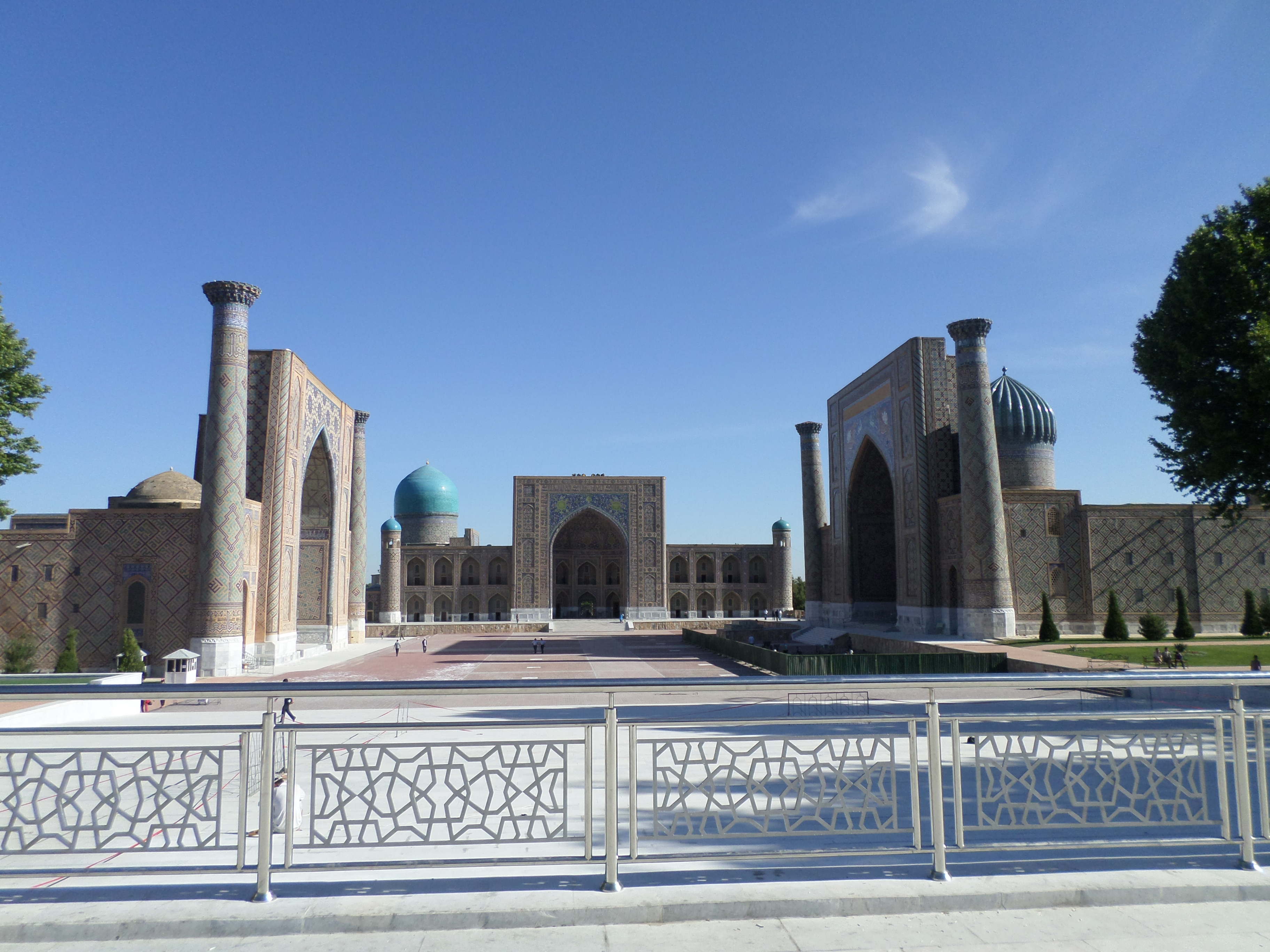 Registan square - Площадь Регистан2014г.